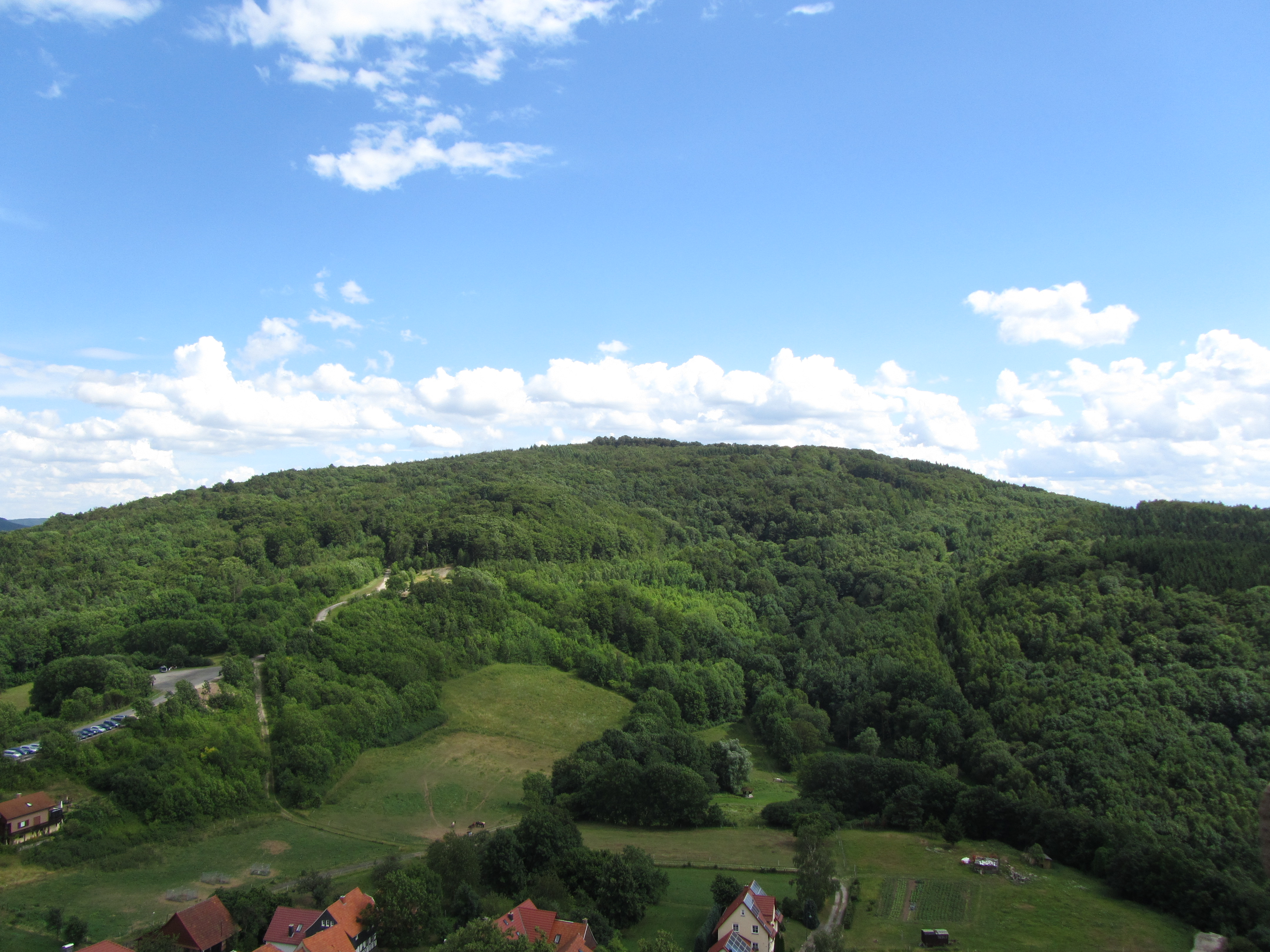 Blick vom Turm der Burg Hanstein über Rimbach zur Junkerkuppe, links am Bildrand ein Parkplatz mit anschließenden Wanderweg zur Teufelskanzel (einschließlich Eichsfeld-Wanderwg und Herkulesweg), rechts ist noch der ehemalige Grenzverlauf erkennbar